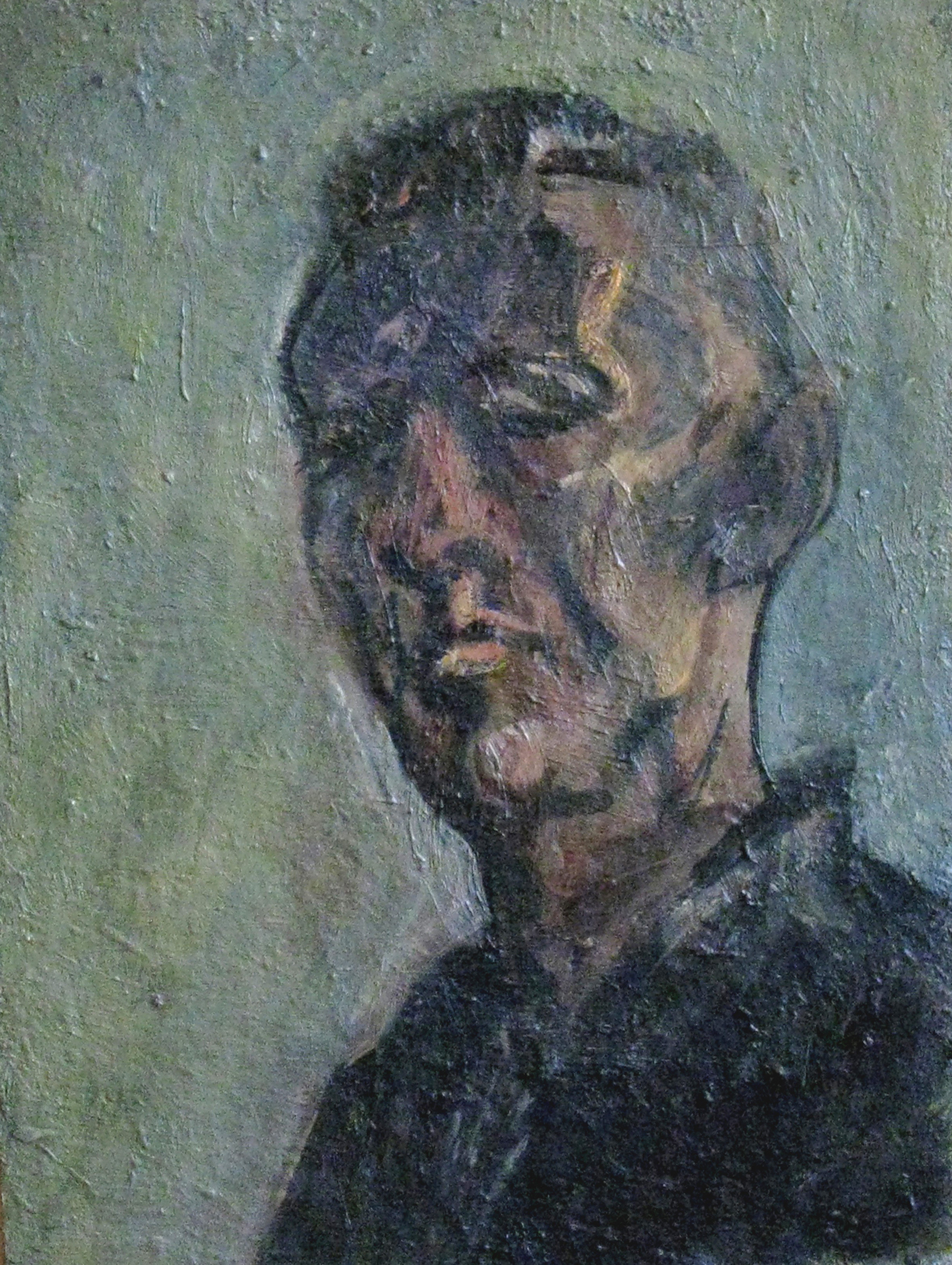 Self-portrait